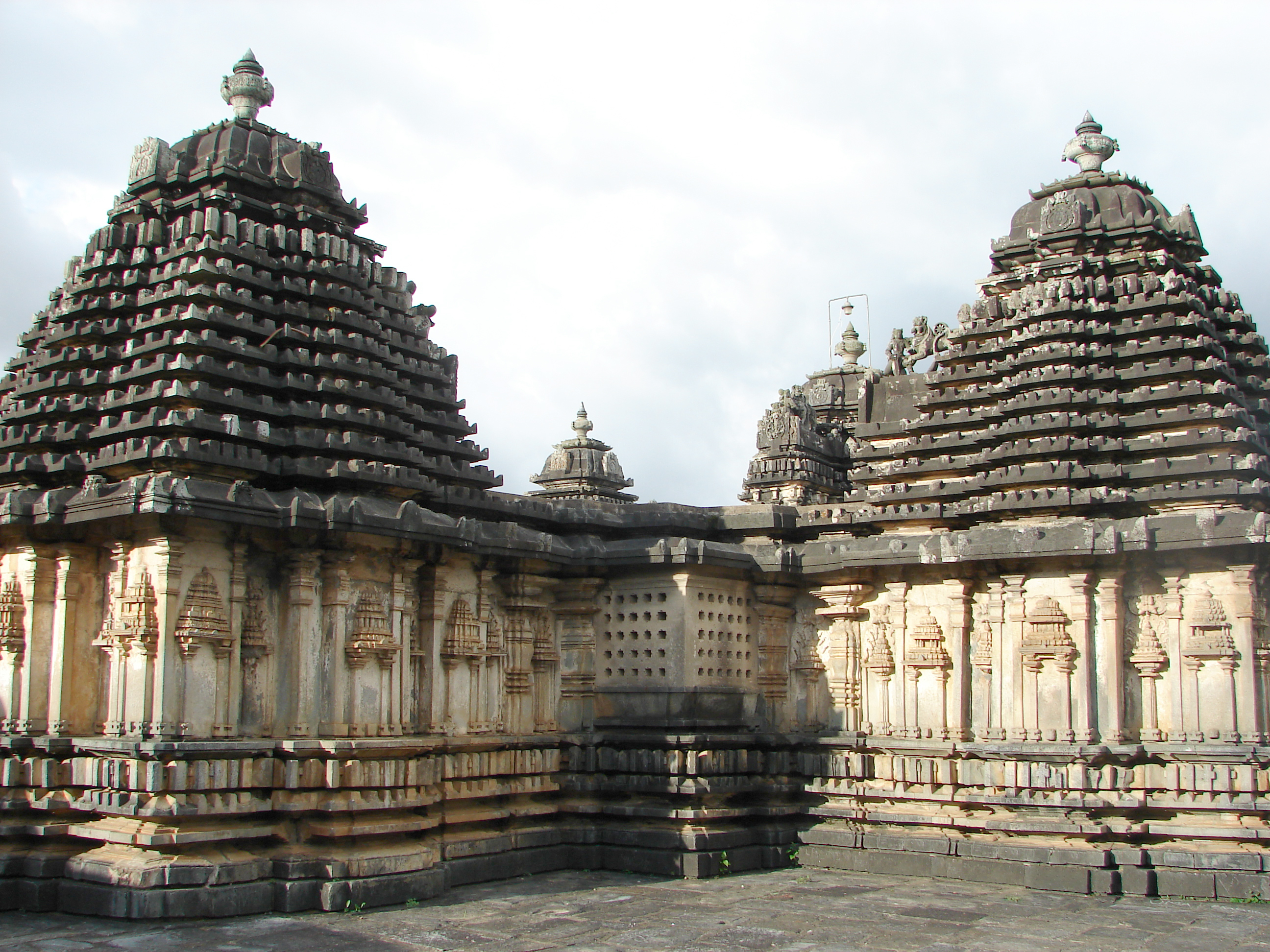 Lakshmi Devi temple at Doddagaddavalli, Karnataka, India